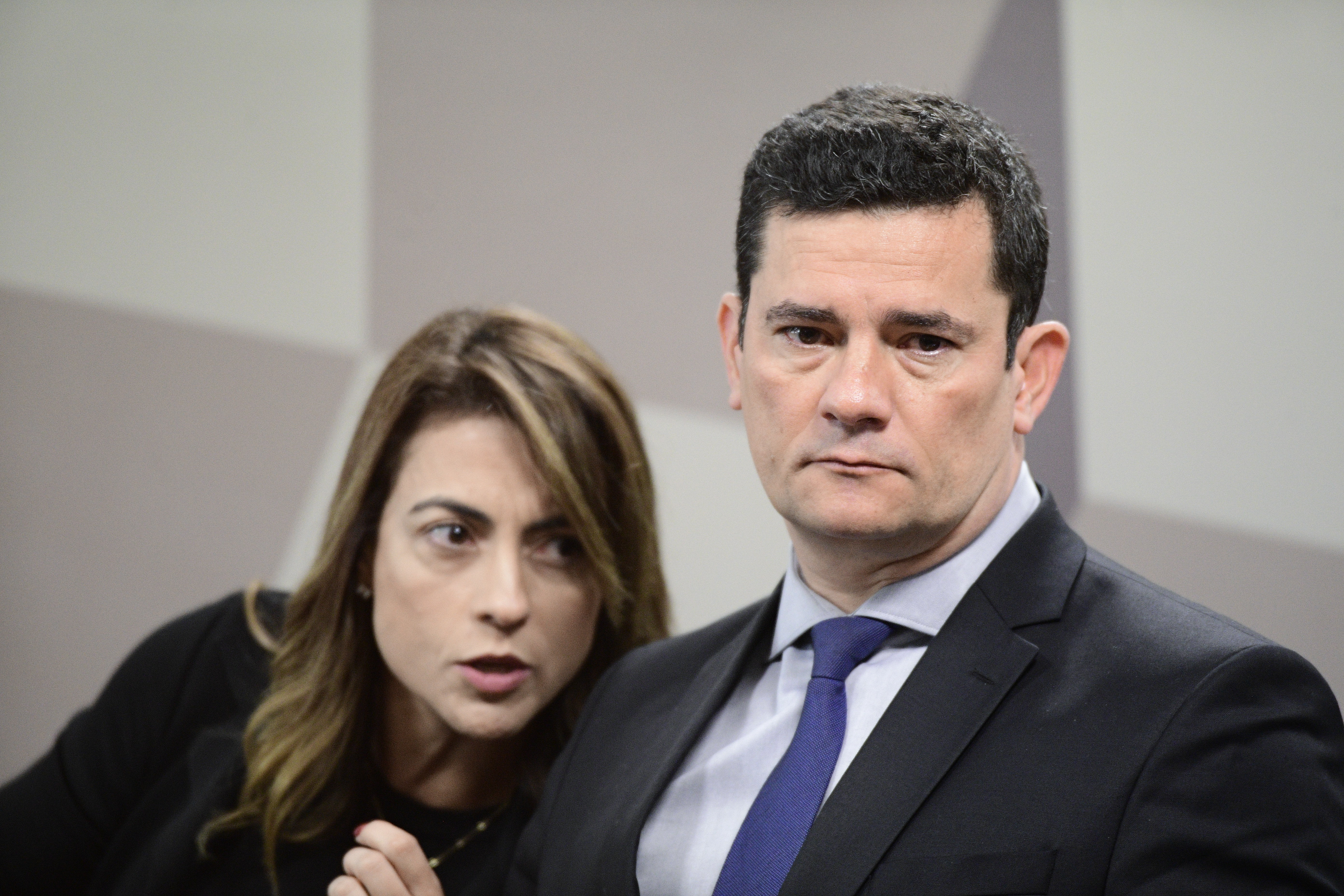 Comissão de Constituição, Justiça e Cidadania (CCJ) realiza audiência pública para ouvir o ministro de Estado da Justiça e Segurança Pública, sobre informações e esclarecimentos a respeito das notícias veiculadas na imprensa relacionadas à Operação Lava Jato. E/D: senadora Soraya Thronicke (PSL-MS); ministro de Estado da Justiça e Segurança Pública, Sergio Moro.